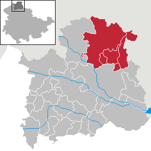 Verwaltungsgemeinschaft Hohnstein/Südharz in Thüringen, Landkreis Nordhausen